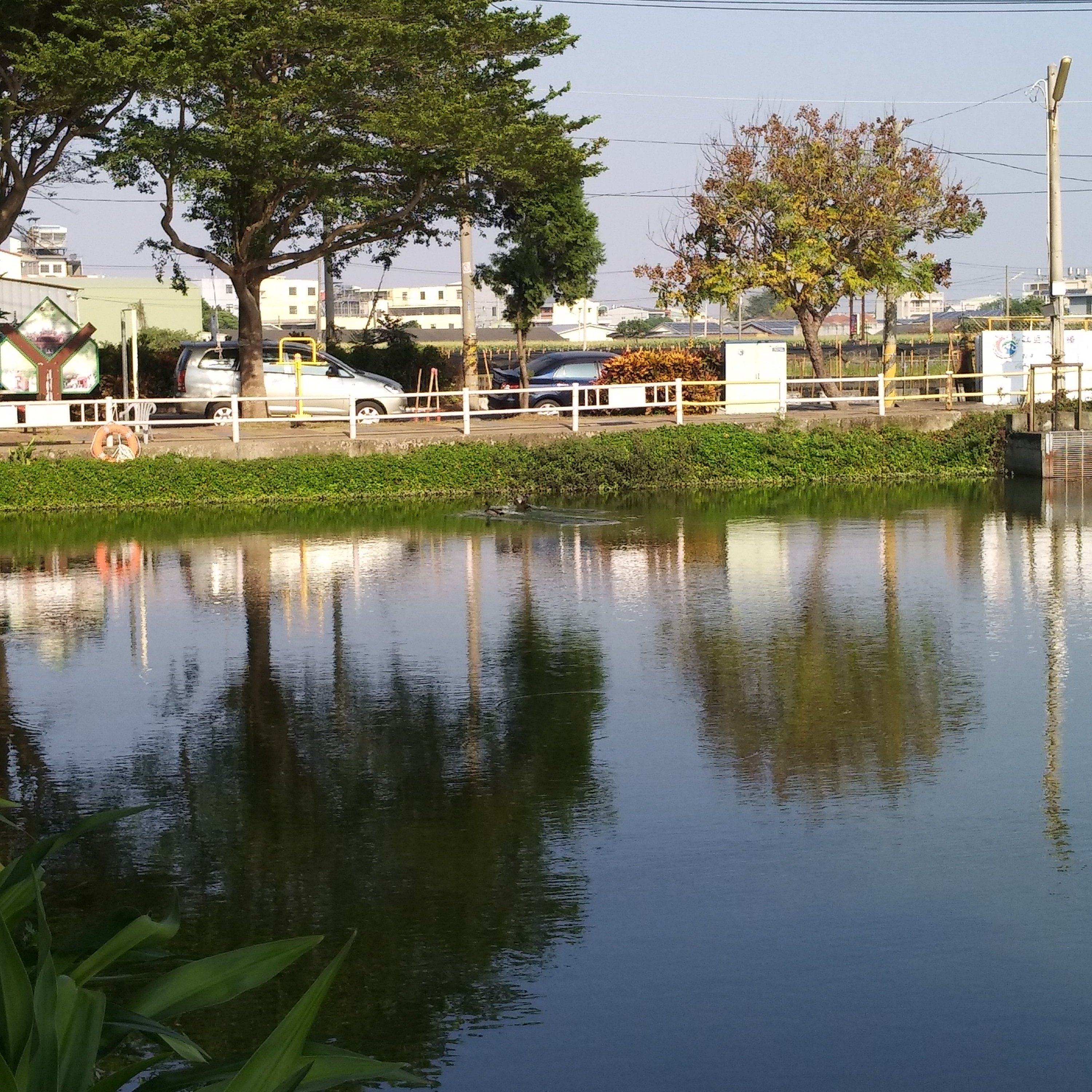 埒內公園綠地湖泊